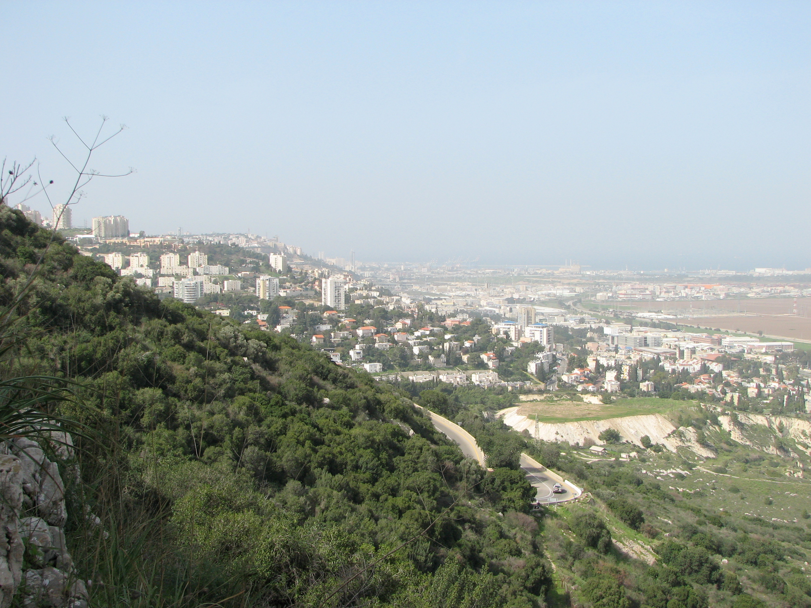 Nesher Green Paths, between Nesher - Yagur on Mount Carmel Israel. View from the path השביל הירוק בין העיר נשר וקיבוץ יגור, על הצלע הצפונית של הר הכרמל. מראות על השביל מחצבת נשר הישנה גבעת העמדות וגבעת נשר